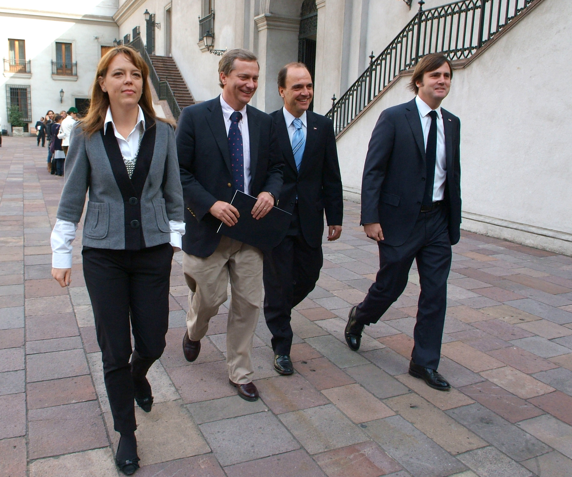 La Ministra Secretaria General de Gobierno,Ena von Baer,recibe a los diputados,Cristián Monckeberg,Pedro Browne y José Antonio Kast.Palacio de La Moneda.